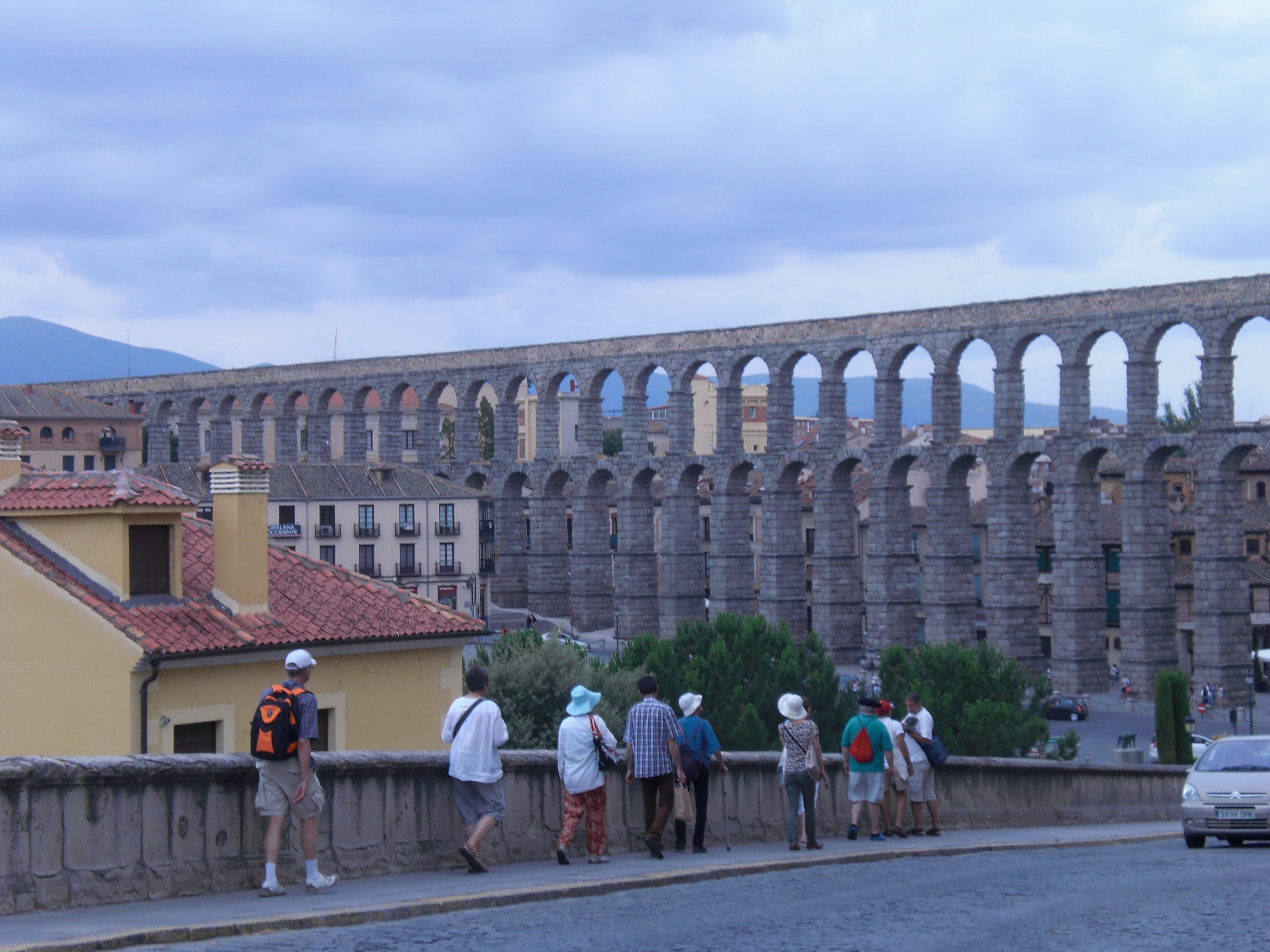 akvedukto